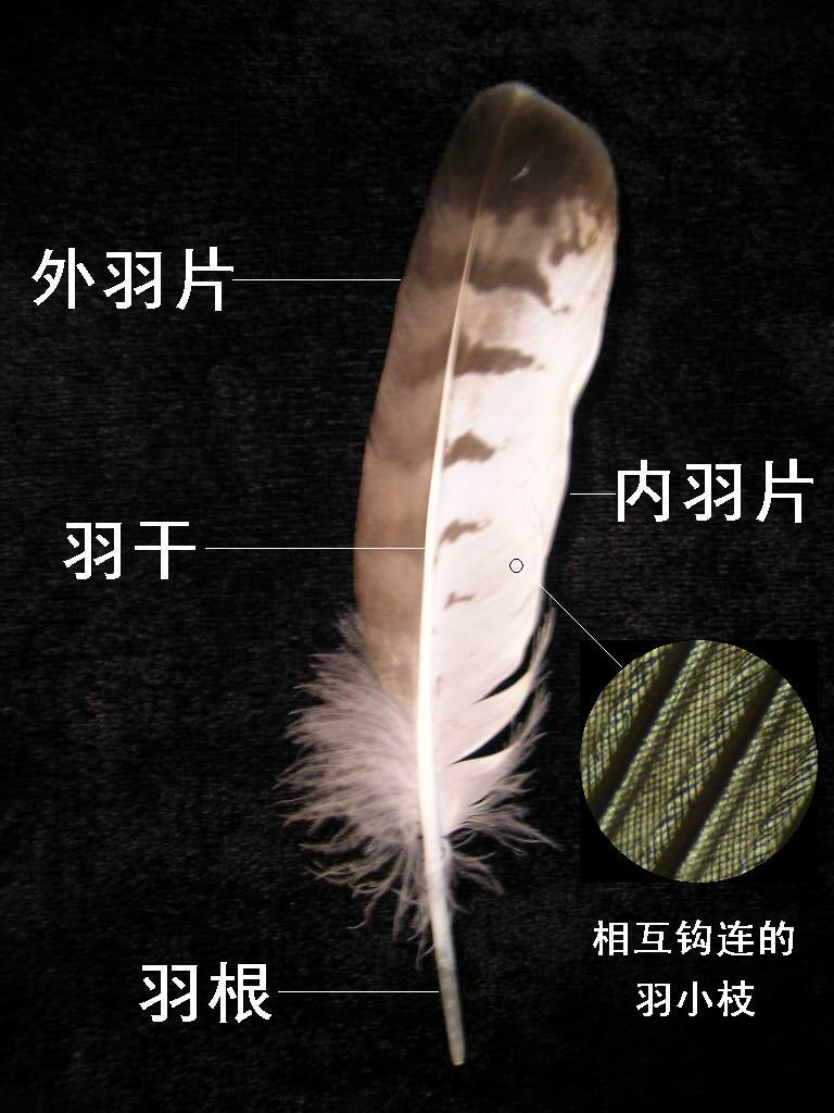 羽毛的结构，smartneddy制作 羽毛是zh:2004年zh:7月底在内蒙古zh:额尔古纳地区取自一只亚成的zh:普通鵟尸体。后面的黑背景是我弟弟的衣服:P